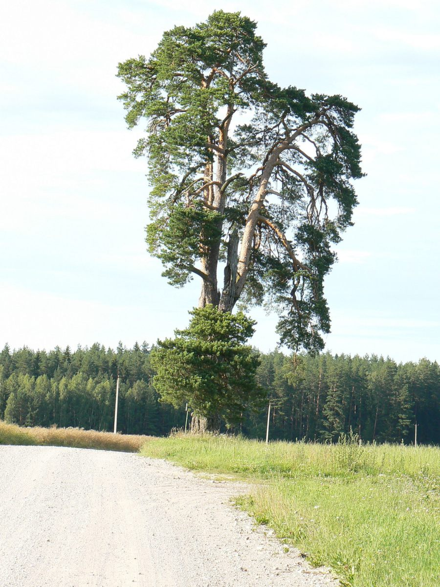 Karo kakutu pettai